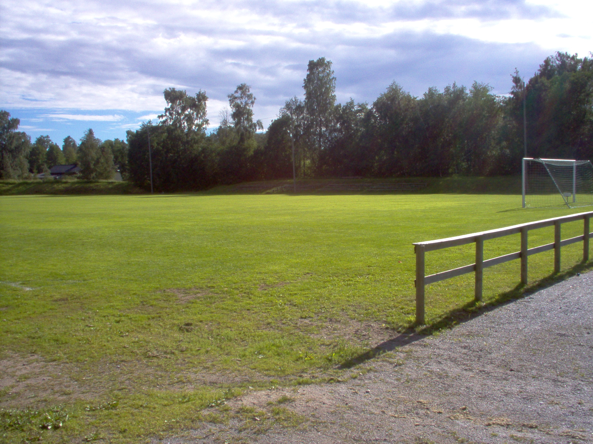 Pietarsaaren länsikenttä